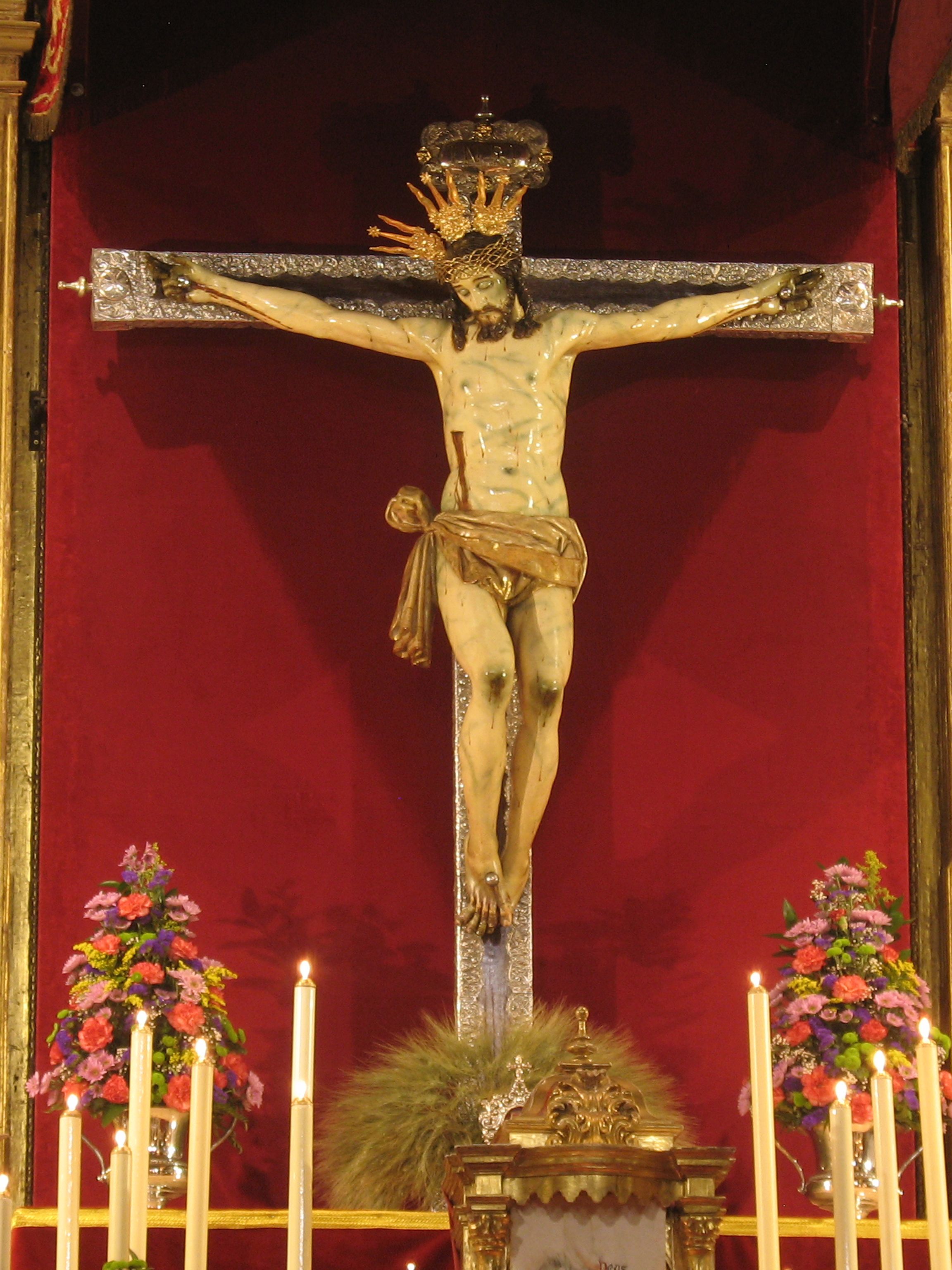 Señor de la Salud y de las Aguas. Imagen de Cristo crucificado perteneciente a la iglesia de San Juan Bautista de Antequera.